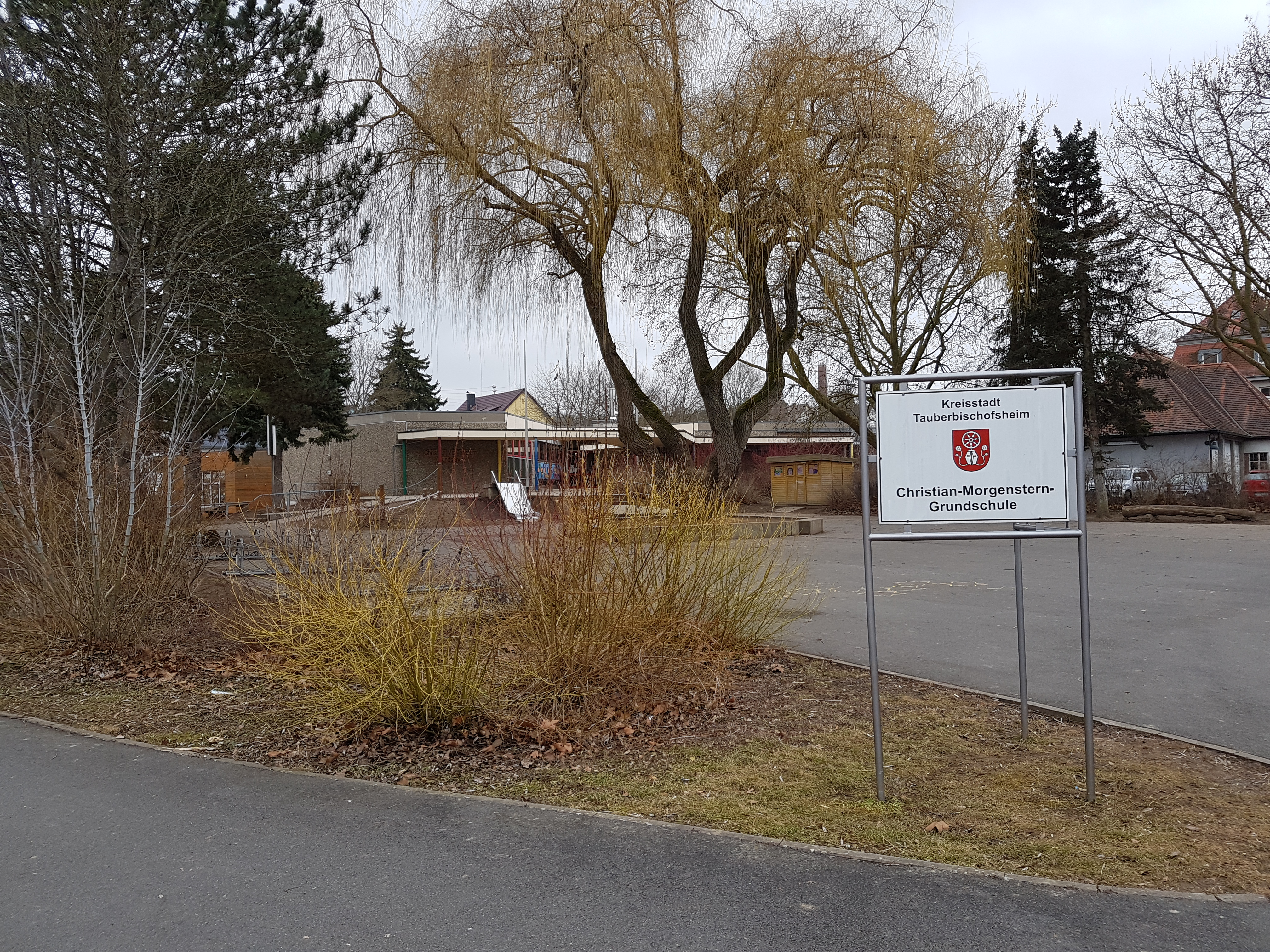 TBB